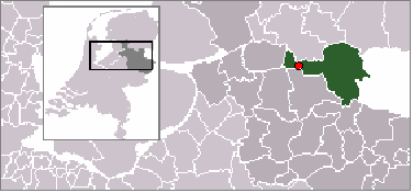 Locatie van Balkbrug binnen de gemeente Hardenberg. Afbeelding gemaakt door Marco Roepers op basis van kaart vervaardigd door Gebruiker:Mtcv Vrij voor gebruik